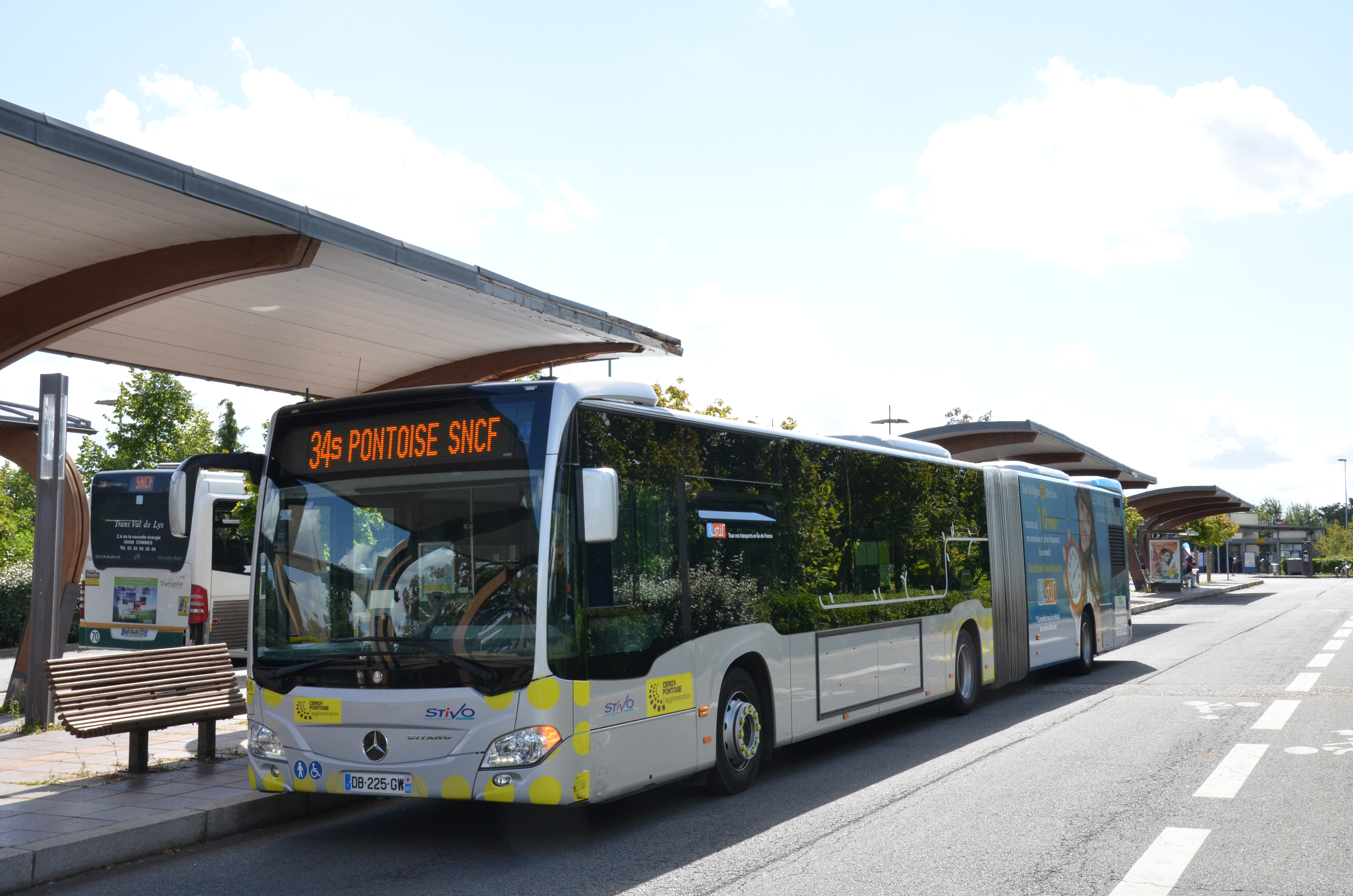 Mercedes Citaro G C2 n°851 sur la ligne 34S du réseau STIVO de Cergy-Pontoise, à la gare routière de Neuville Université.